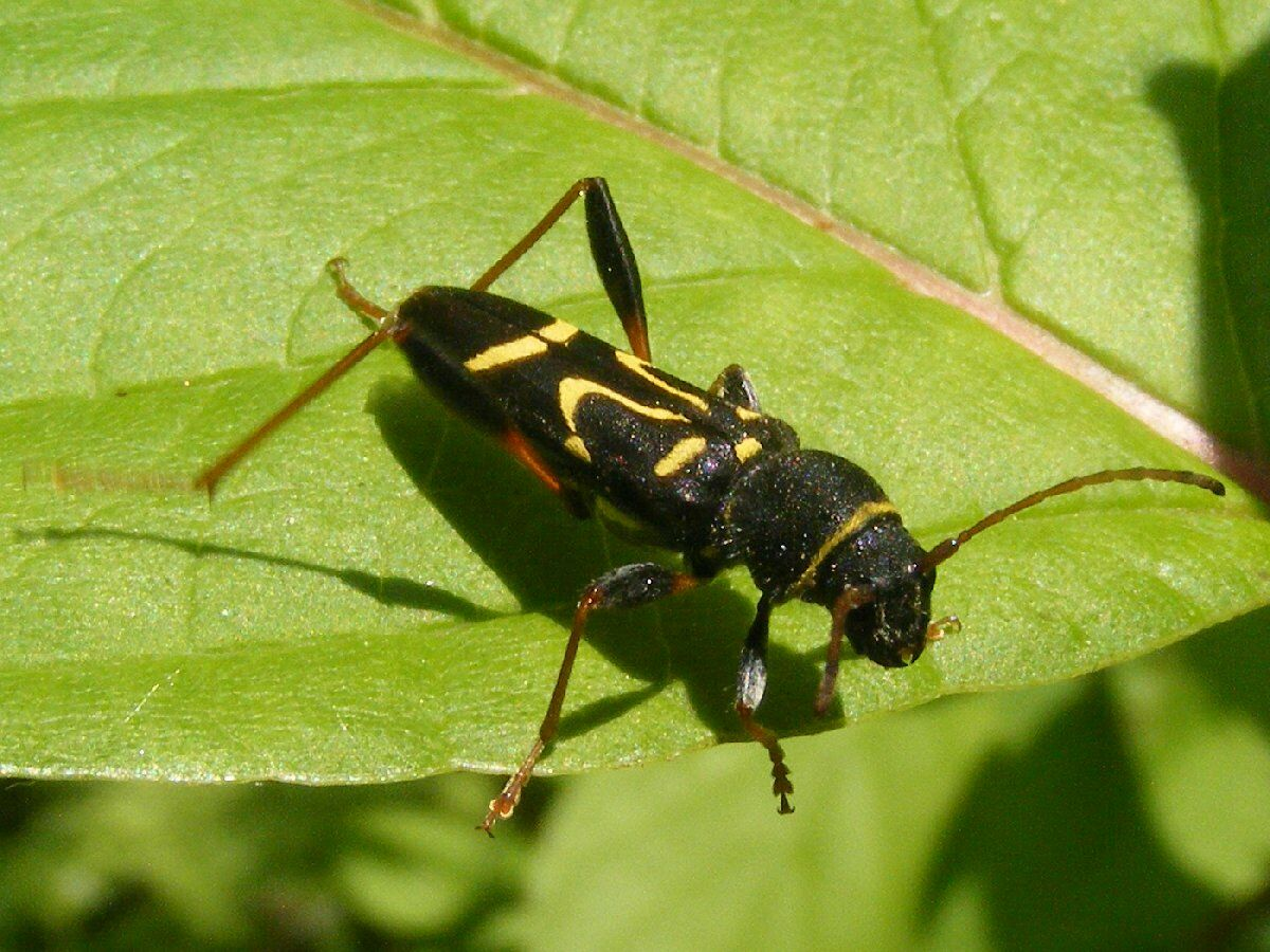 Longicorne des champs